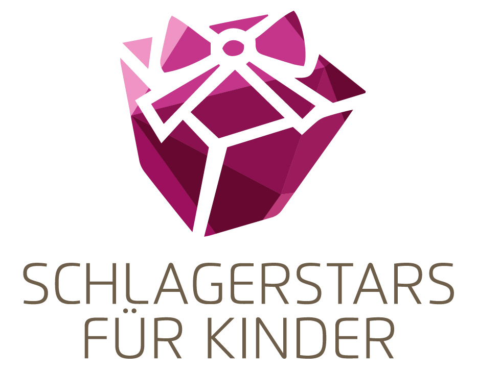 Die Gruppe mit dem Namen Schlagerstars für Kinder setzt sich für Kidner in Not ein. Dafür hat die Gruppe im Jahr 2017 erstmalig den Song "Auf Einmal" veröffentlicht.